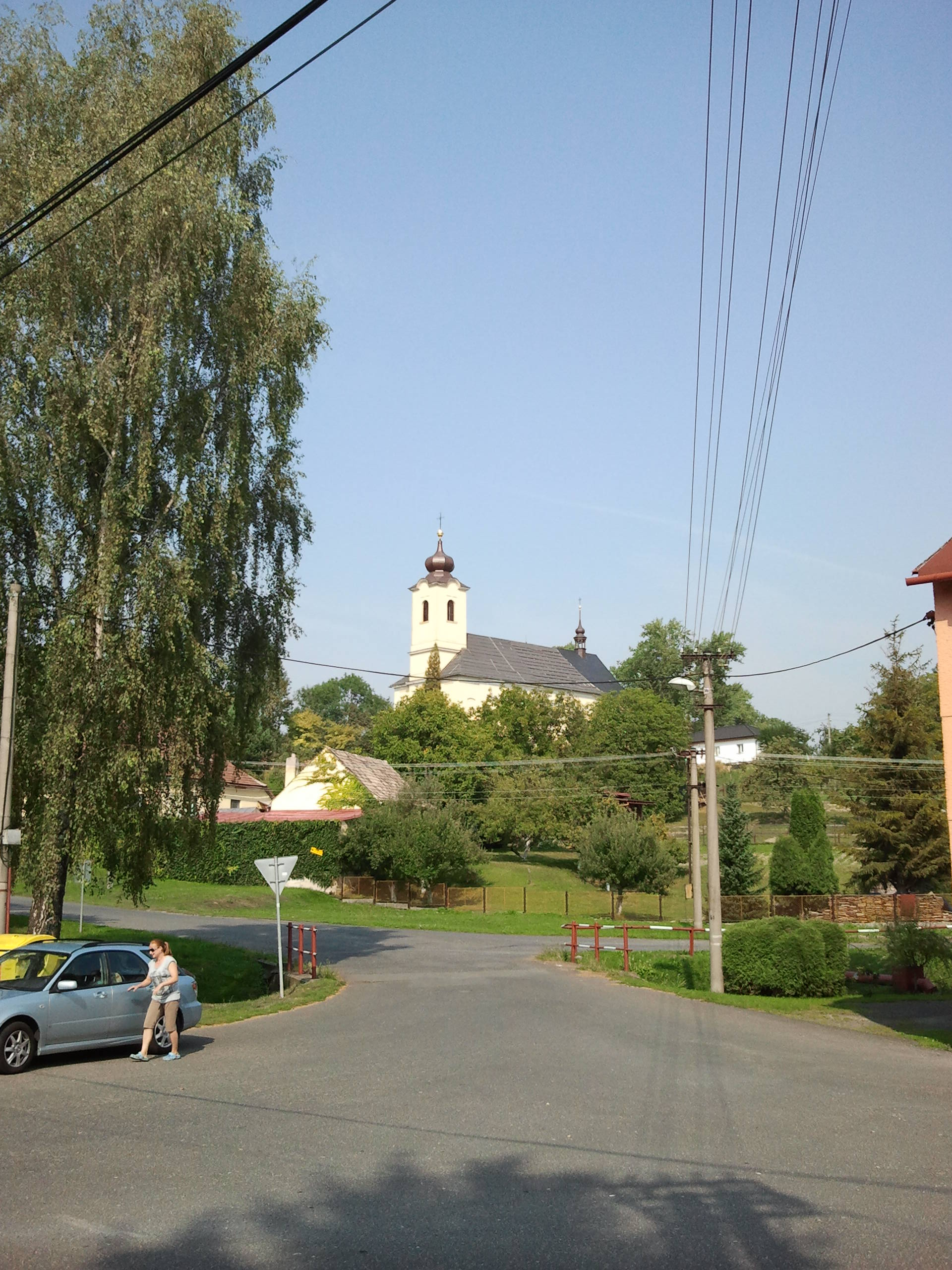 Kostel sv. Petra a Pavla (Jistebník), návrší nad obcí, Jistebník